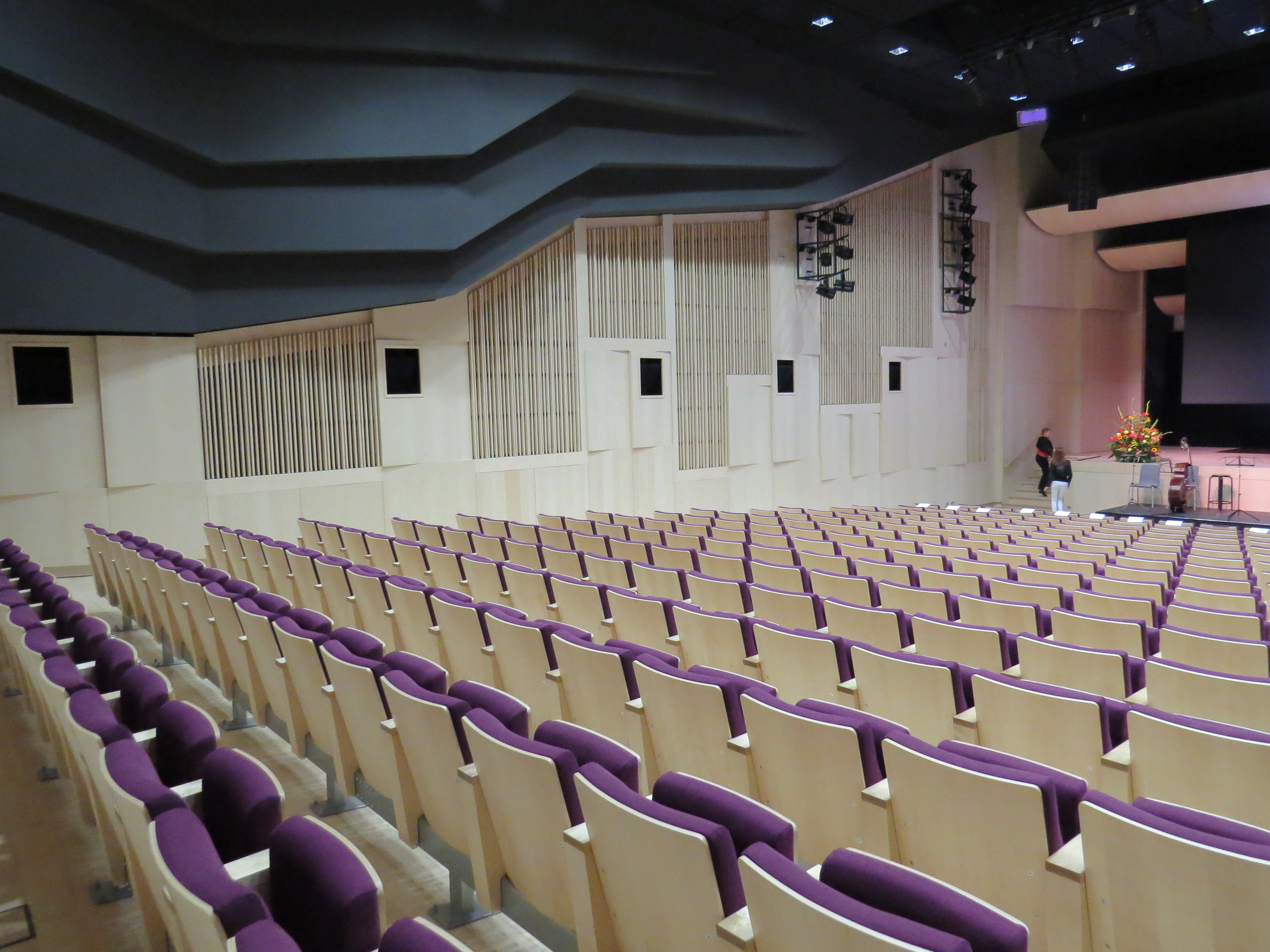 Ziedonis Koncertsal i Letlands Nationalbibliotek - Gaismas pils - i Riga